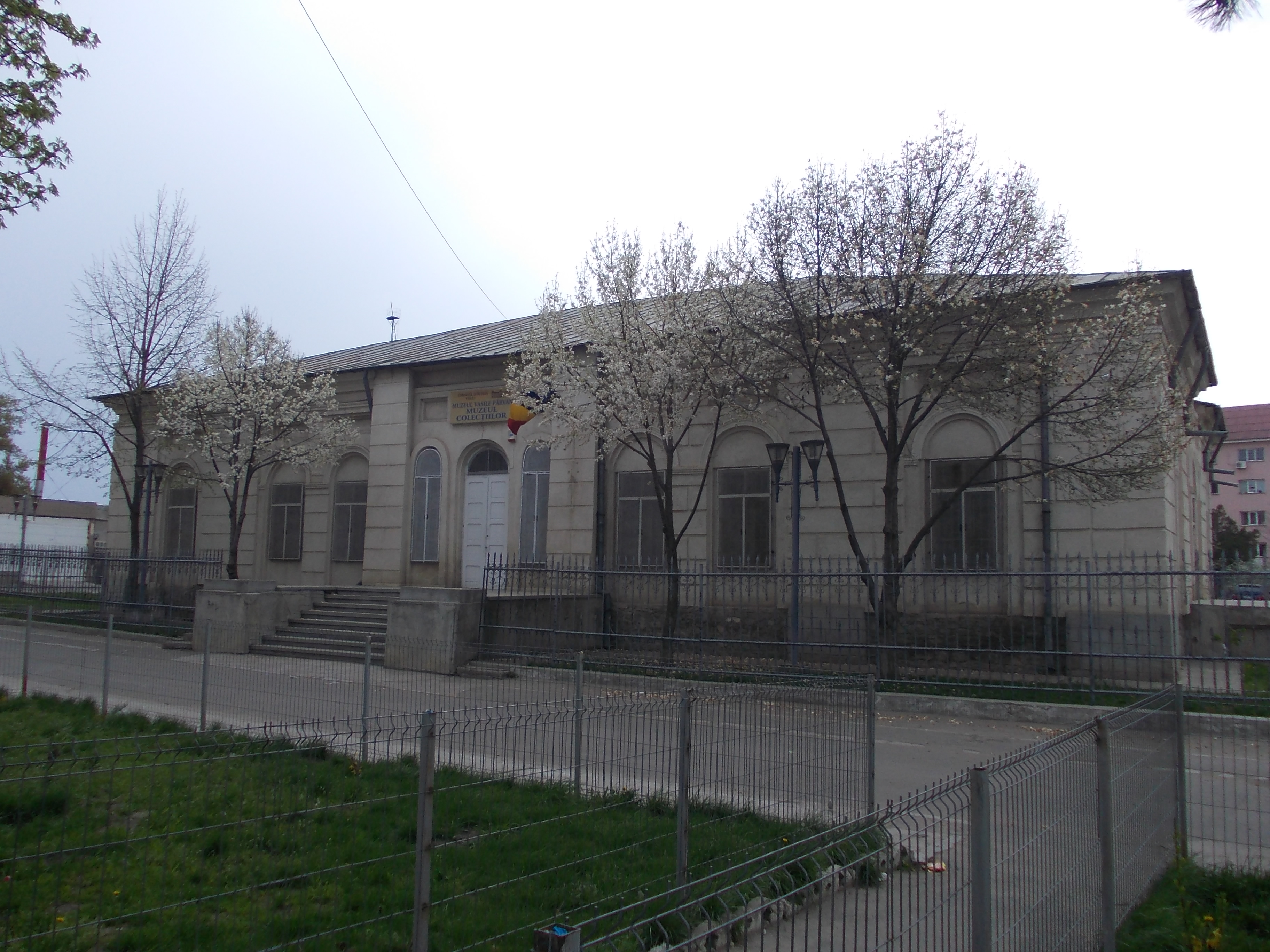 Casa Sturdza - Muzeul Colectiilor Barlad